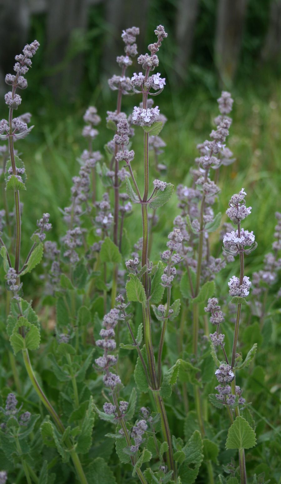 Nepeta nuda subsp. nuda, Lippenblütler (Lamiaceae) - Türkei/Türkiye/Turkey: Prov. Bolu/Bolu ili, Köroğlu Dağları, Sommersiedlung Kızgölcük Yaylası 16-17 km S Bolu, an der Straße nach Kıbrıscık, ca. 1350 m